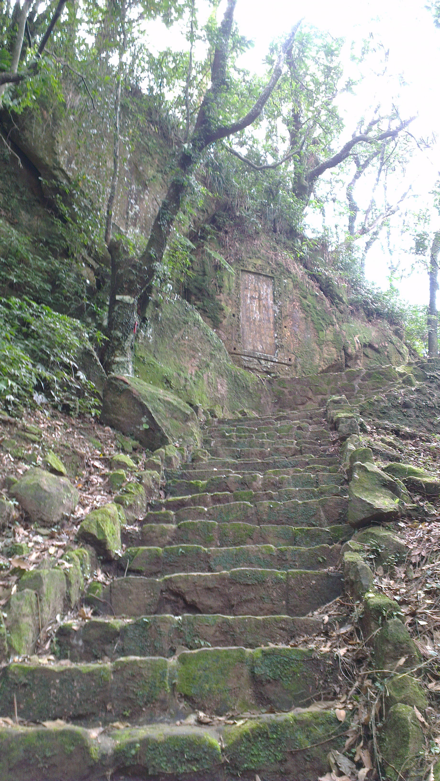 中文（台灣）: 三貂嶺段金字碑